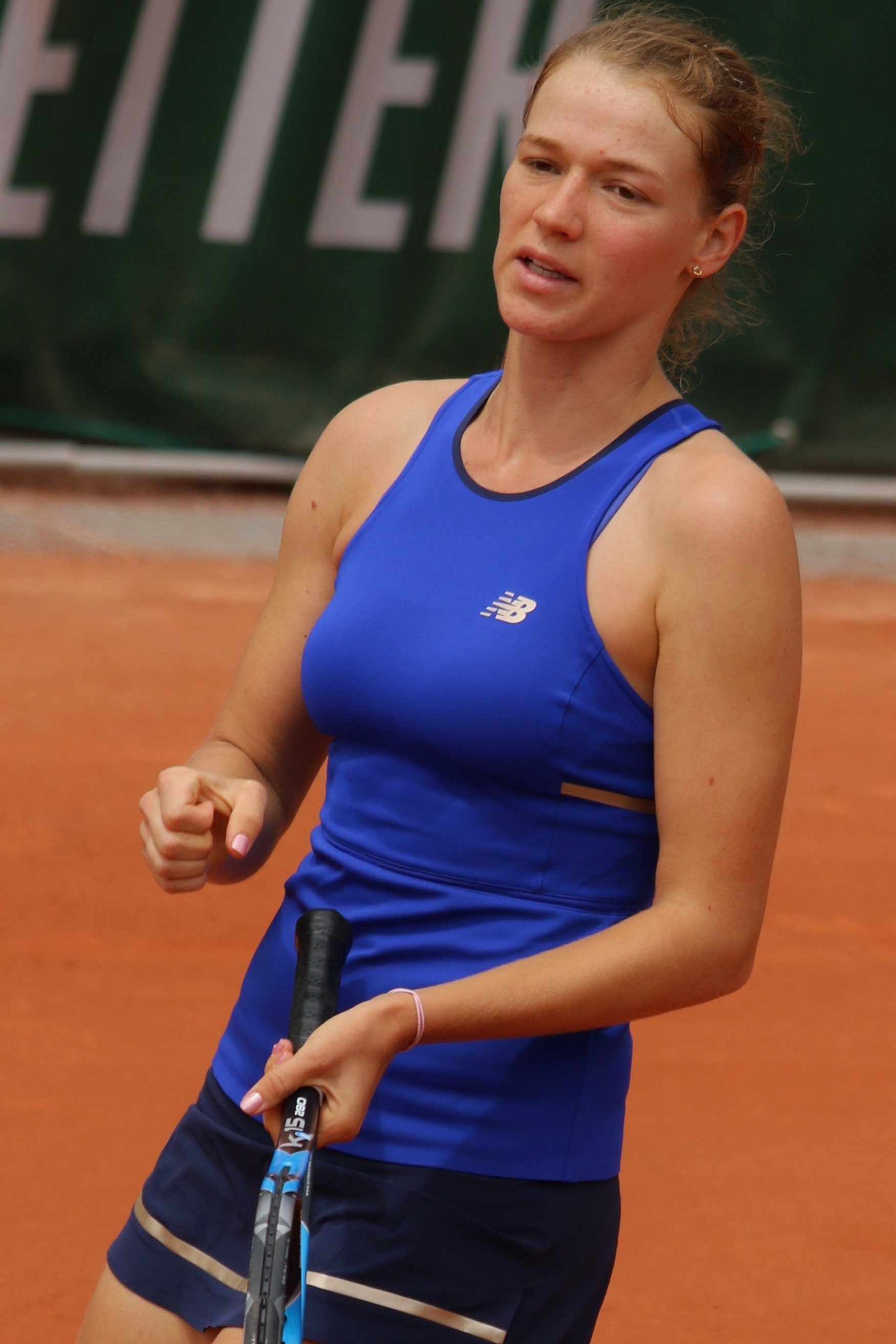 Ponchet RG19 (7)